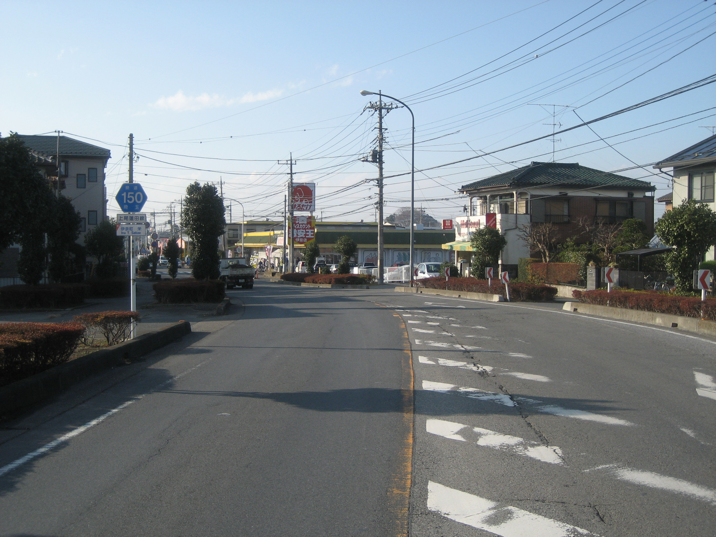 埼玉県道150号線伊奈町内